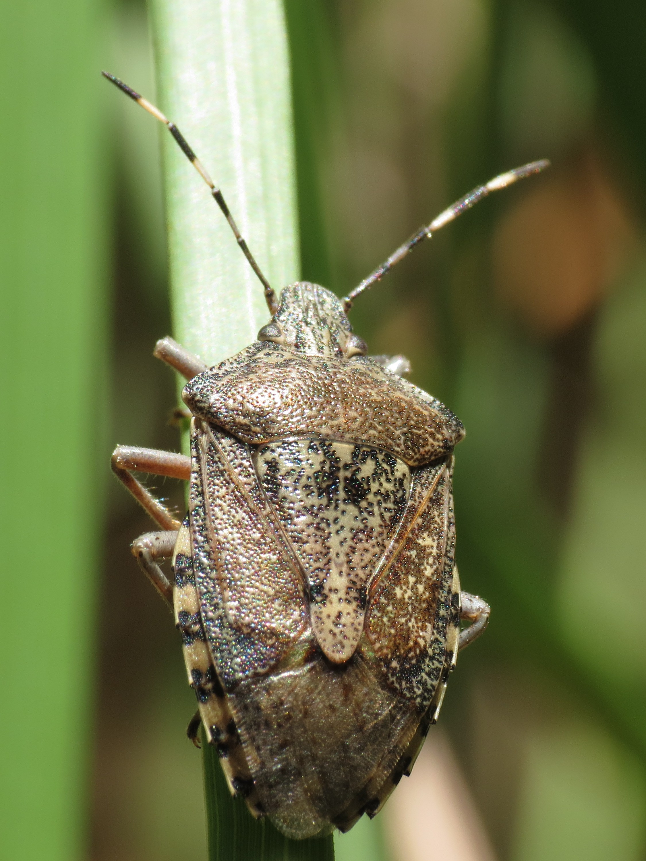 Rhaphigaster nebulosa Poda, 1761, Pont del Diable, Tarragona, Spain, 16 May 2013